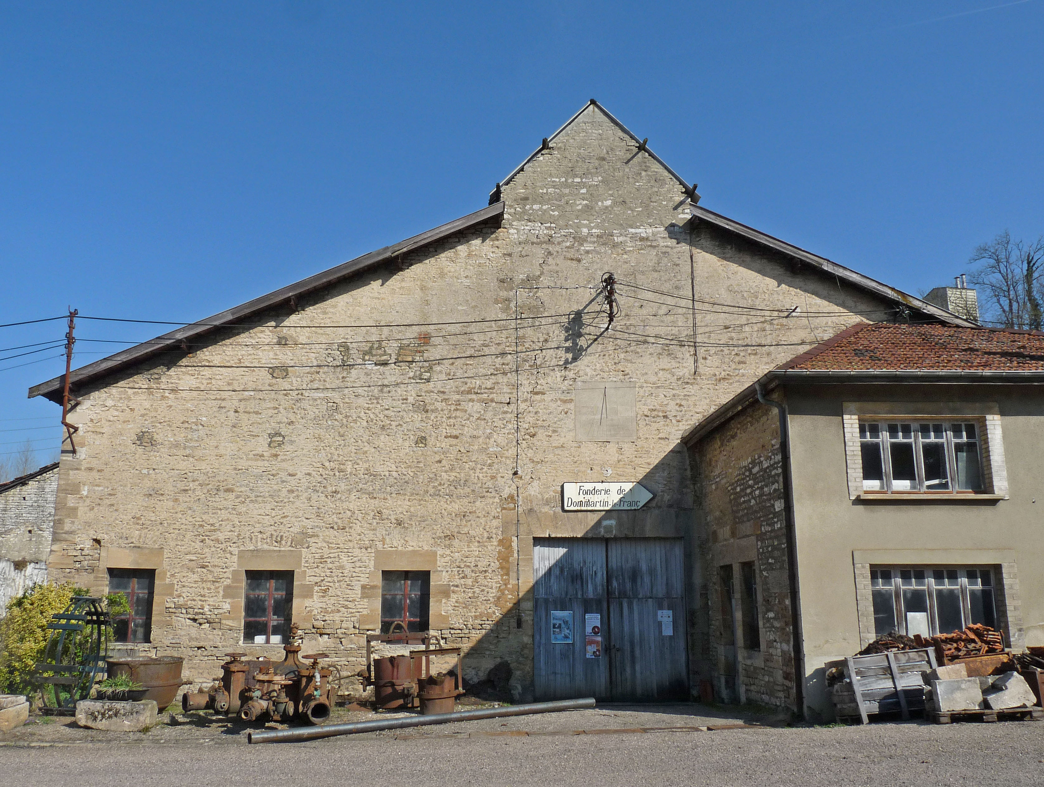 Fonderie d'art de Dommartin-le-Franc (Haute-Marne).